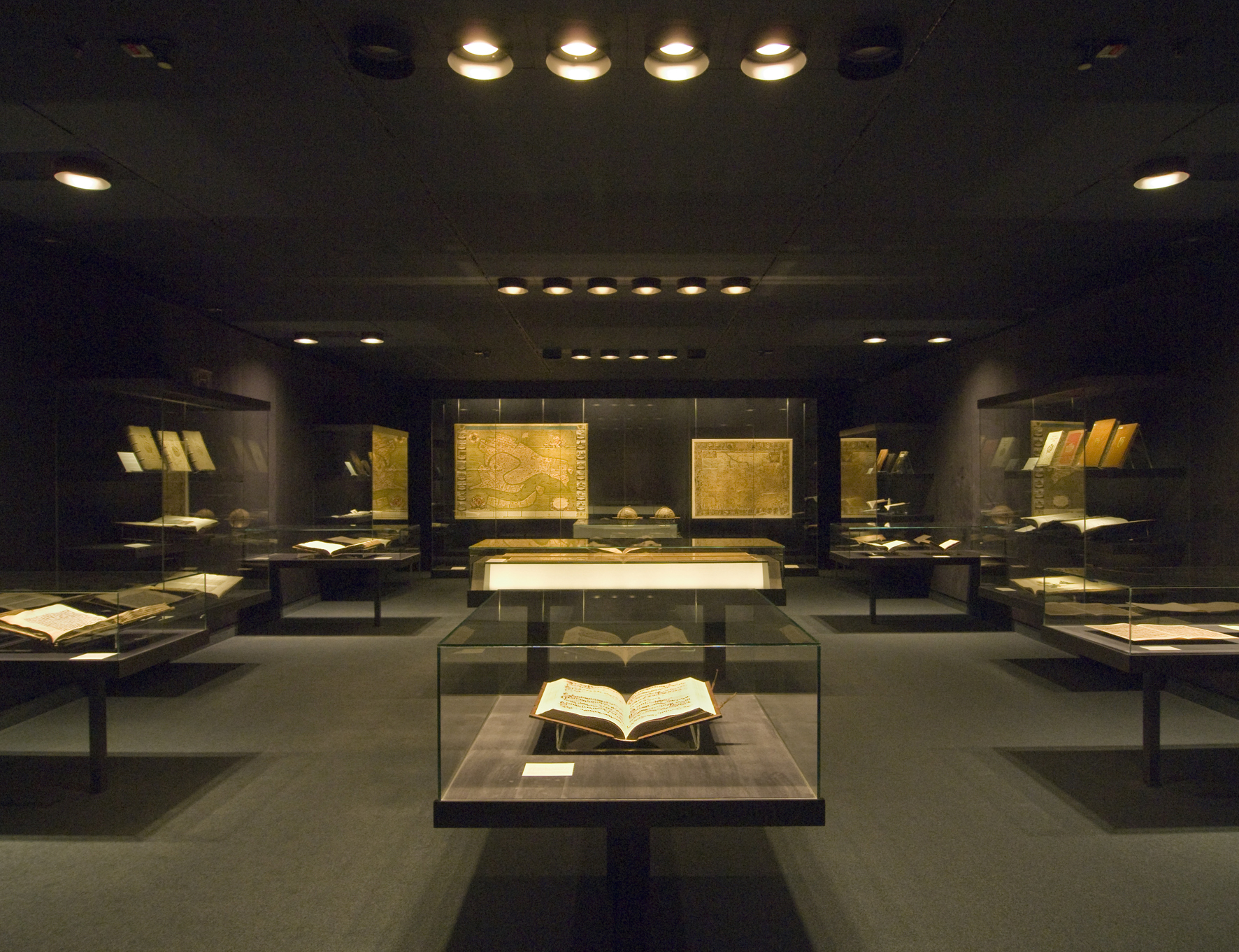 In der Schatzkammer des Buchmuseums werden Kostbarkeiten aus dem Bestand der SLUB gezeigt: die Maya-Handschrift, einzigartige Handschriften, Wiegendrucke und Autographe berühmter Persönlichkeiten. Die Schatzkammer kann täglich von 10 bis 18 Uhr besucht werden. Foto: SLUB Dresden / Henrik Ahlers